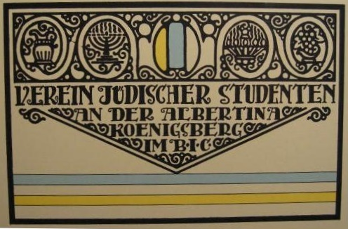 Der Jüdische Studentenverein der Albertina zu KÖnigsberg